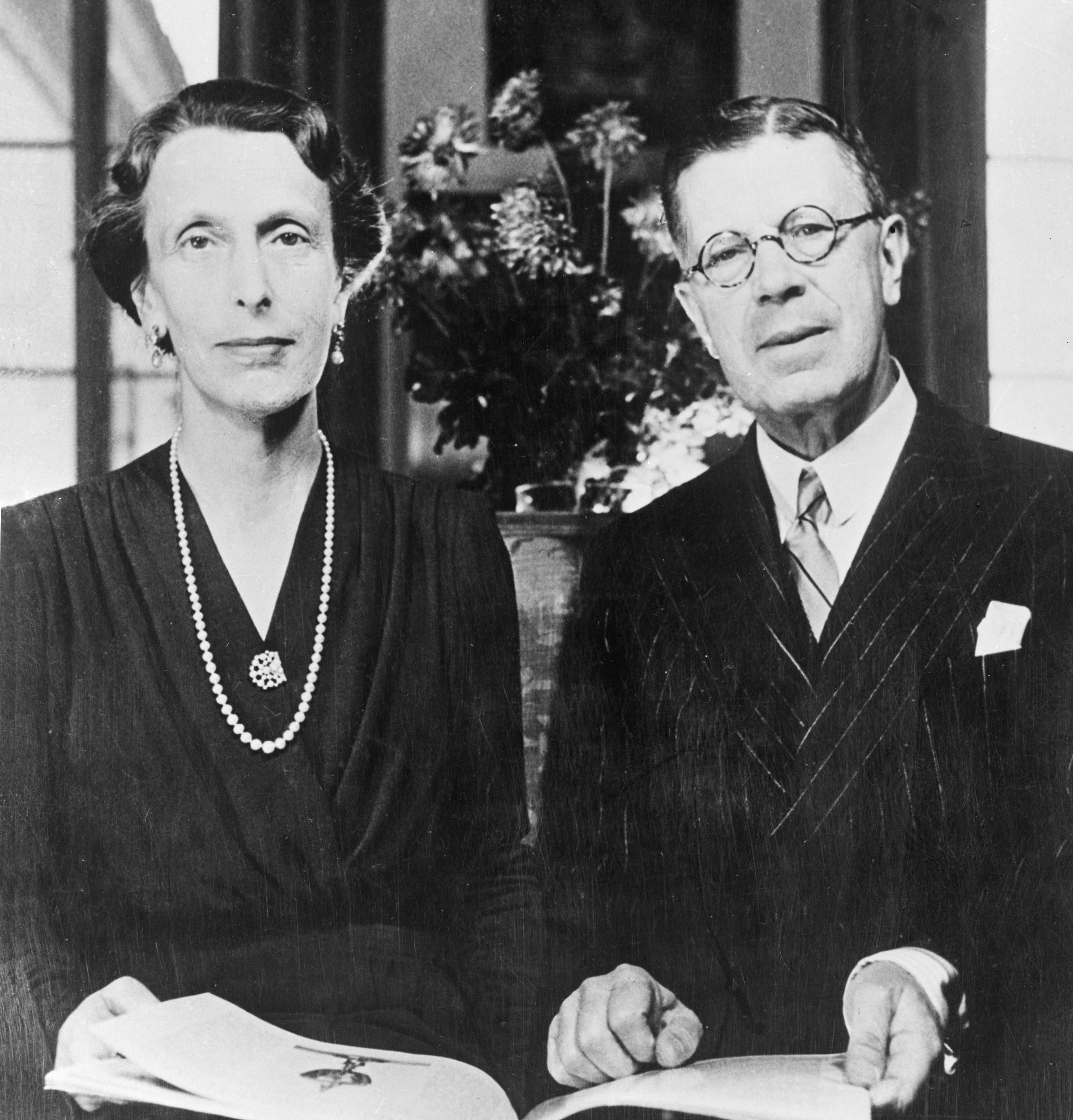 Prins Gustaaf Adolf vna Zweden en zijn echtgenote Marie Louise